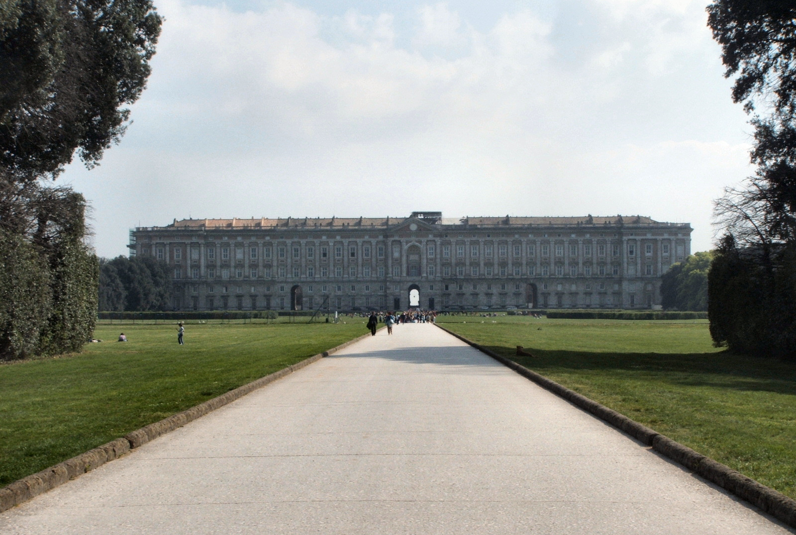 Reggia di Caserta, Caserta, Campania, Italia. Il prospetto posteriore che si affaccia sul parco della Reggia.